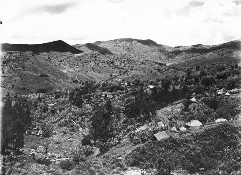 Landschaft in den Usambarabergen, b.d. Missionssation Mlalo